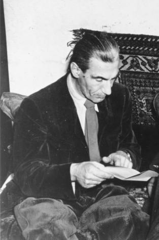 Title: Sozialistische Reichspartei, Dorls, Remer, Westarp Extra information: Sozialistische Reichspartei.- vlnr: Fritz Dorls, Otto-Ernst Remer, Wolf Graf von Westarp People in the image: Remer, Otto-Ernst: Generalmajor, Ritterkreuz (RK), Heer, Vorsitzender der Sozialistischen Reichspartei (SRP), Bundesrepublik Deutschland (GND 119198908) * Westarp, von Graf: SS-Führer, Führer der Sozialistischen Reichspartei, Bundesrepublik Deutschland * Dorls, Fritz Dr.: Schulungsleiter einer Ordensburg, Vorsitzender der Sozialistischen Reichspartei (SRP), Bundesrepublik Deutschland Factual corrections and alternative descriptions are encouraged separately from the original description. Additionally errors can be reported at this page to inform the Bundesarchiv. Original historic description: Zentralbild 14.8.1952 Die nazistische Führung der SRP (Sozialistischen Reichspartei). UBz: V.l.n.r. Der ehemalige Schulungsleiter einer NS-Ordensburg, 1. Vors. der SRP Dr. Dorls, der ehemalige Generalmajor Otto Ernst Remer, 2. Vors. der SRP und der ehemalige SS- und HJ-Führer Graf v. Westarp.